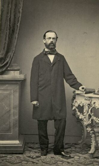 Porträt von Gustav Zeuner